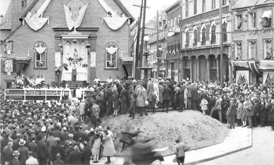 Messe extérieure, Notre-Dame-des-Victoires, congrès marial, 1929